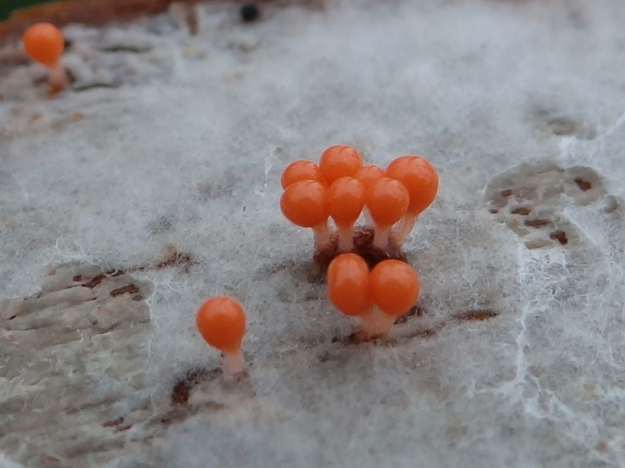 Trichia decipiens (location:Poland)